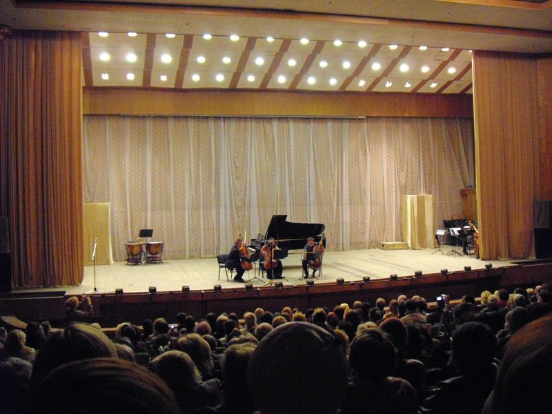 Концертный зал симферопольского музыкального училища